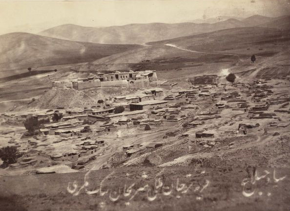 روستای ترجان - یکی از توابع بوکان در قاجاریه (درآن دوران